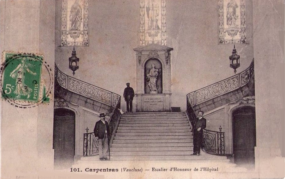 Hôtel-Dieu Carpentras escalier d'honneur